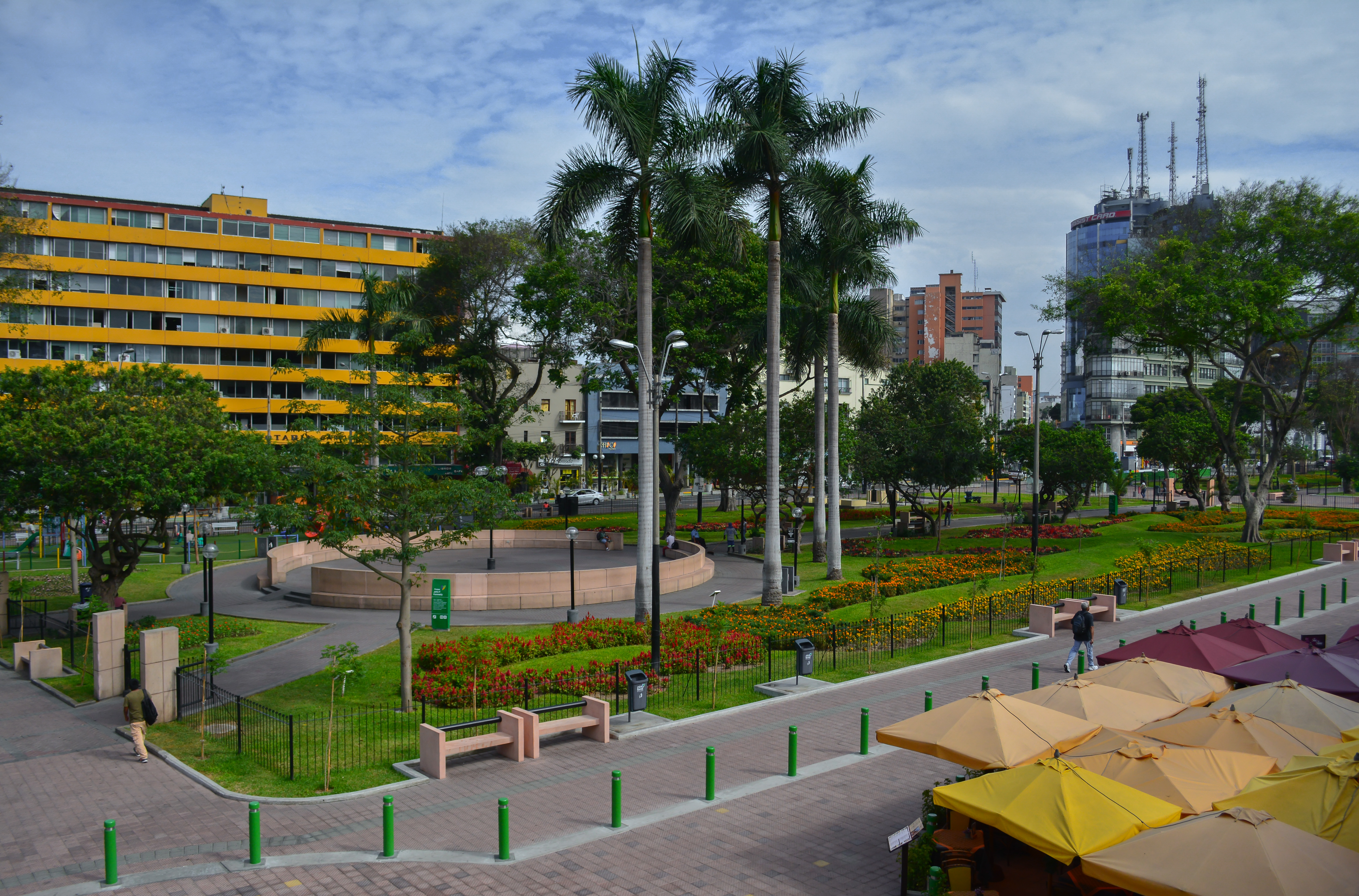 Vista del Parque Kennedy, Miraflores, Lima